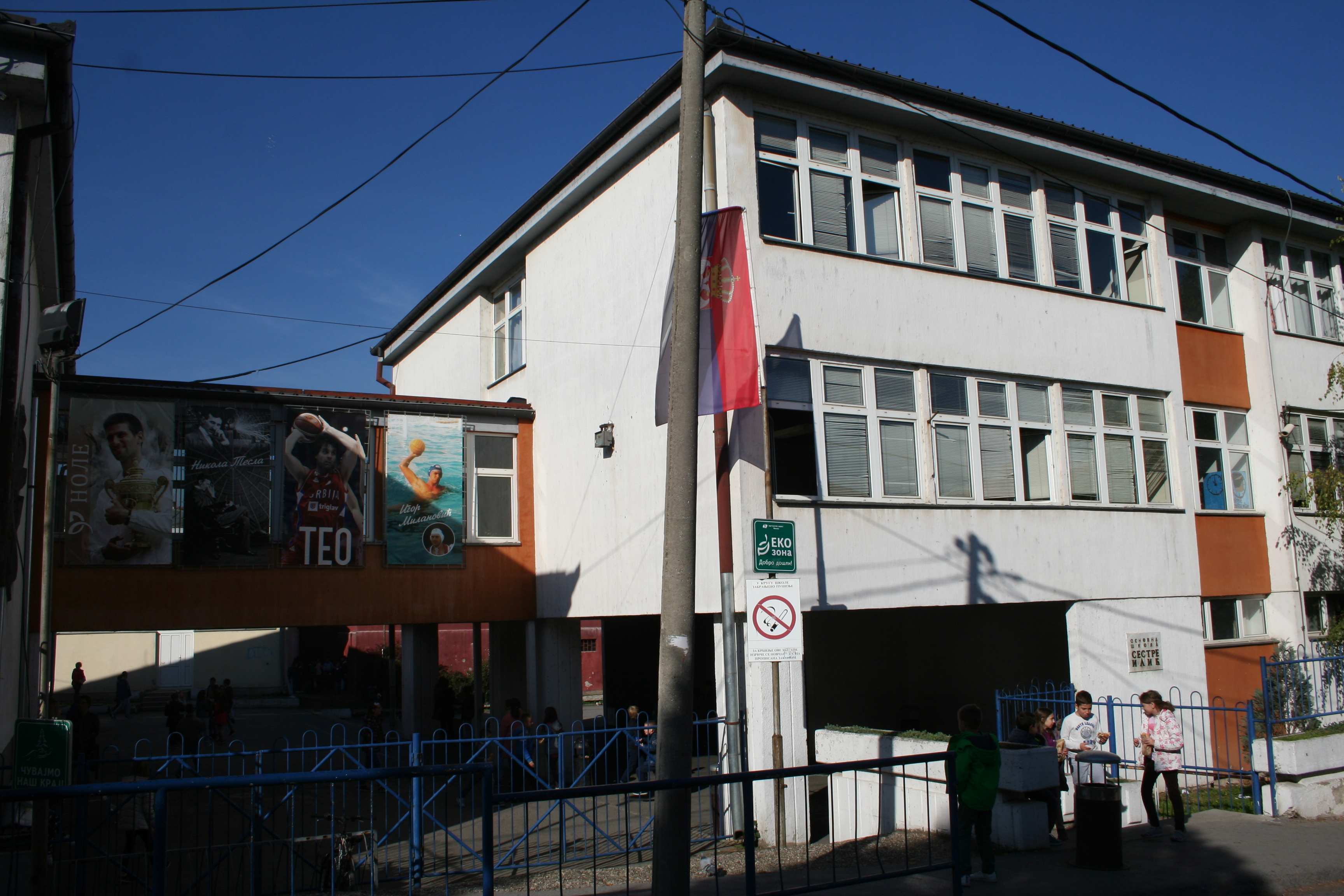 OŠ Sestre Ilić Valjevo